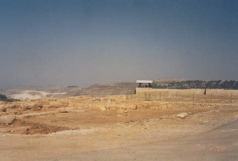 צולם ע"י הגב' אביבה רוסט